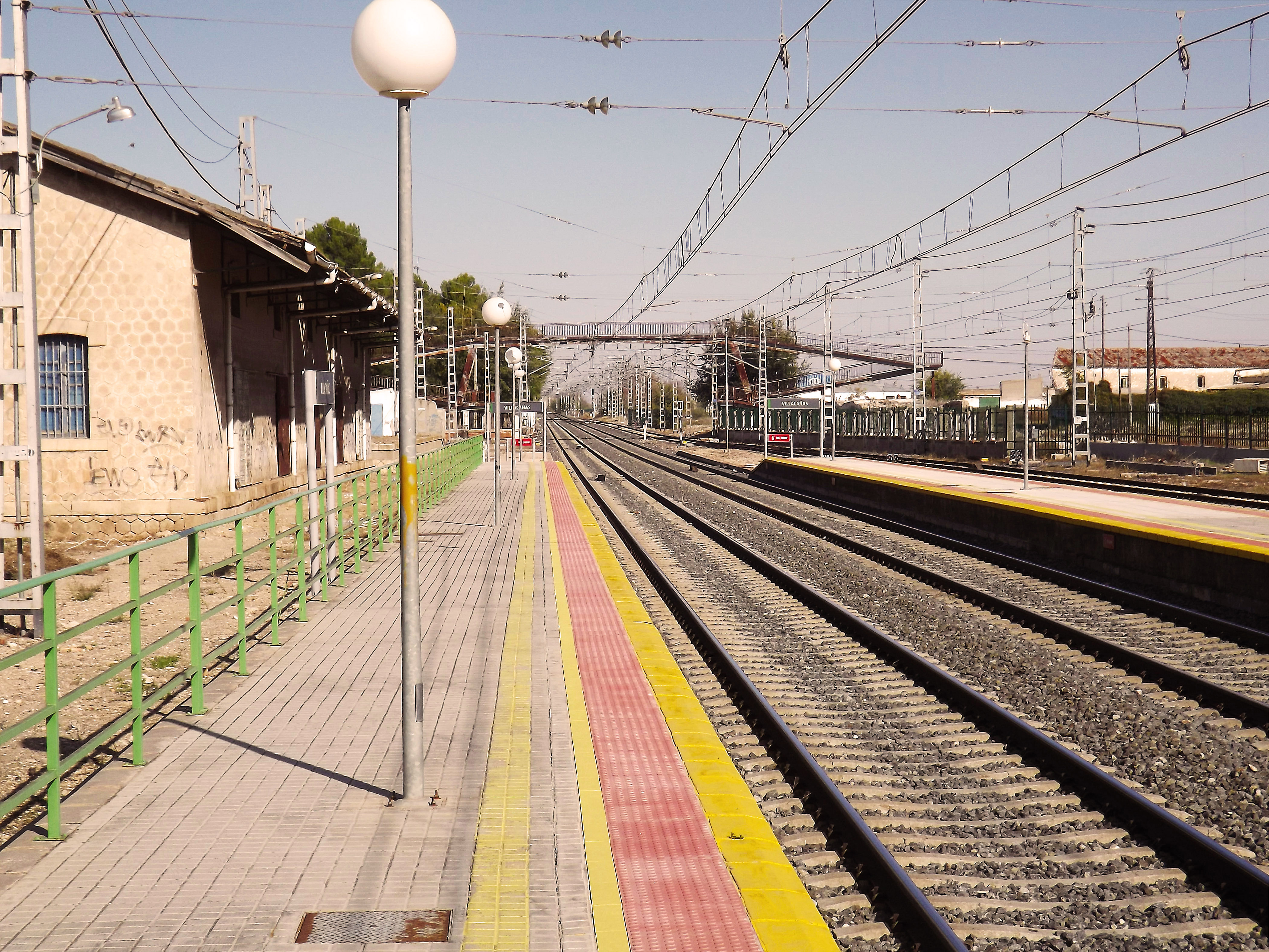 Estación de Villacañas